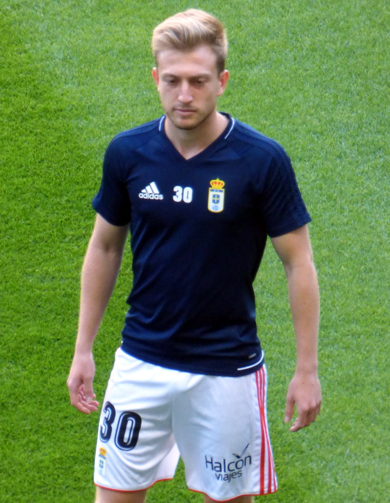 Eduardo Cortina dutante un calentamiento previo a partido de la temporada 2017-18 en el Carlos Tartiere de Oviedo